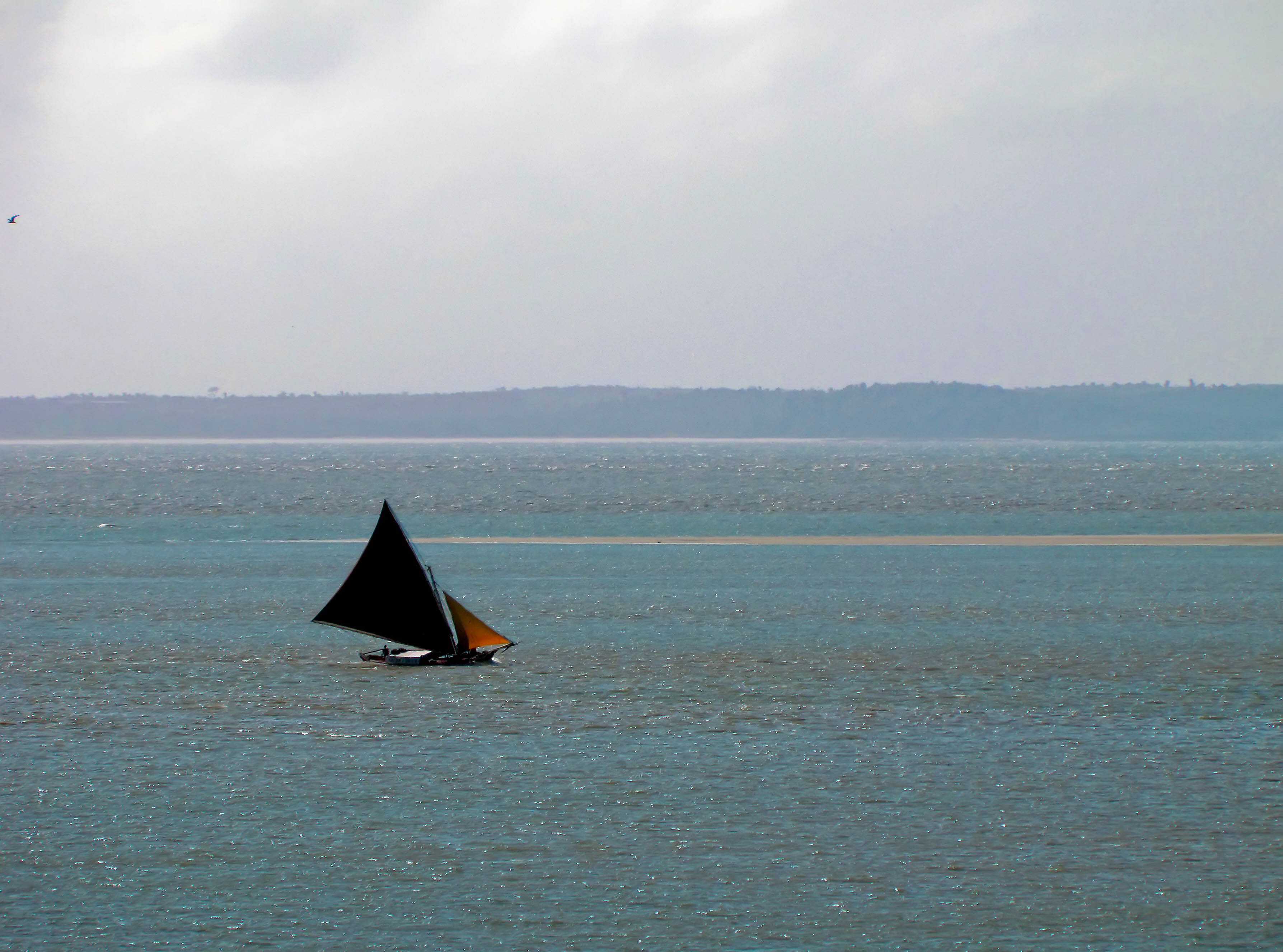 A baía é um estuário de aproximadamente 100 quilômetros de extensão. Ela recebe vários rios, incluindo o Grajaú, Mearim e Pindaré. O Mearim é conhecido por suas pororocas. The bay is an estuary approximately 100 kilometers in length. It receives several rivers, including the Grajaú, Mearim and Pindaré. The Mearim is known for its Pororoca.